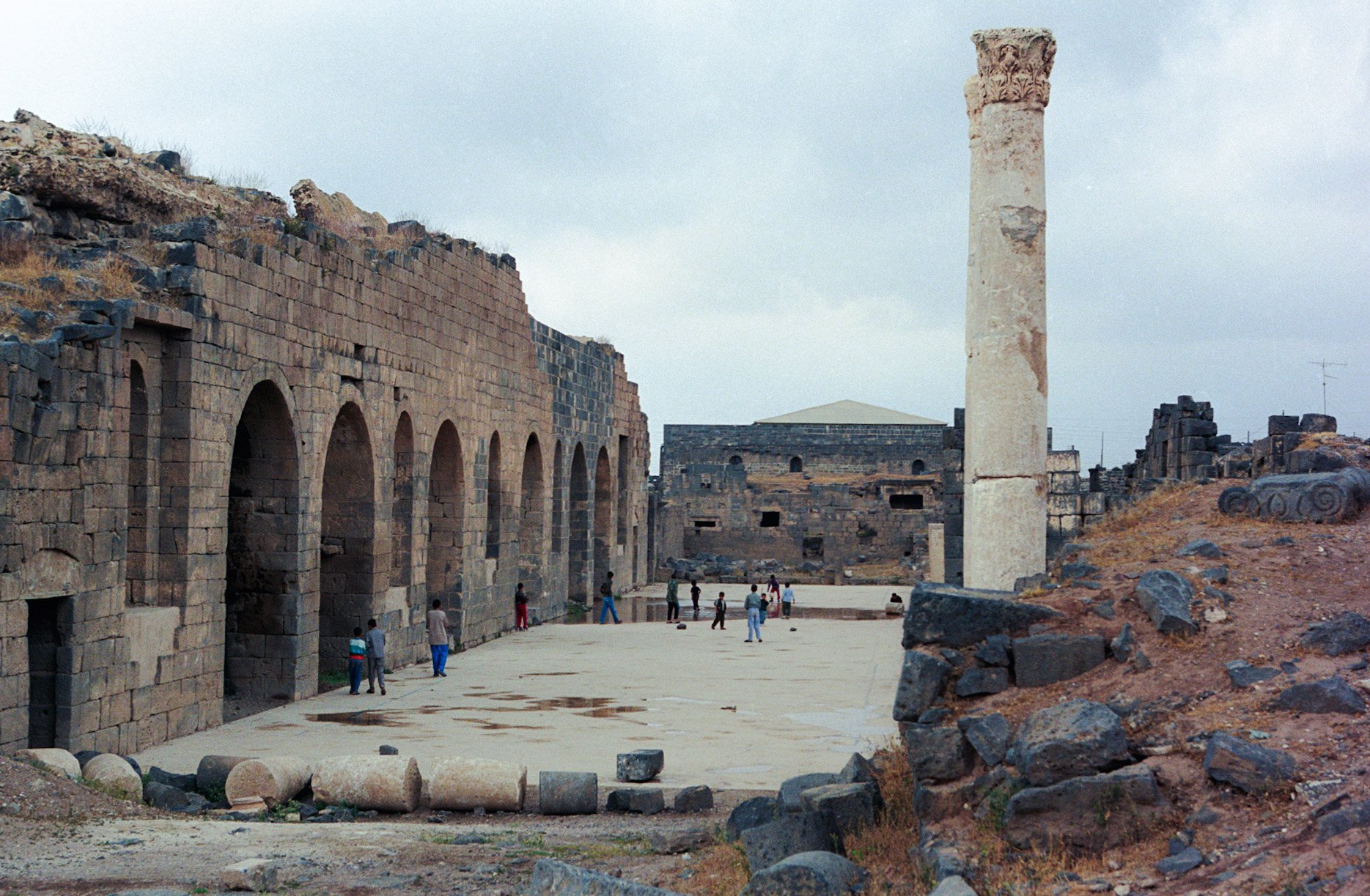 Syria, Bosra, Roman ruins